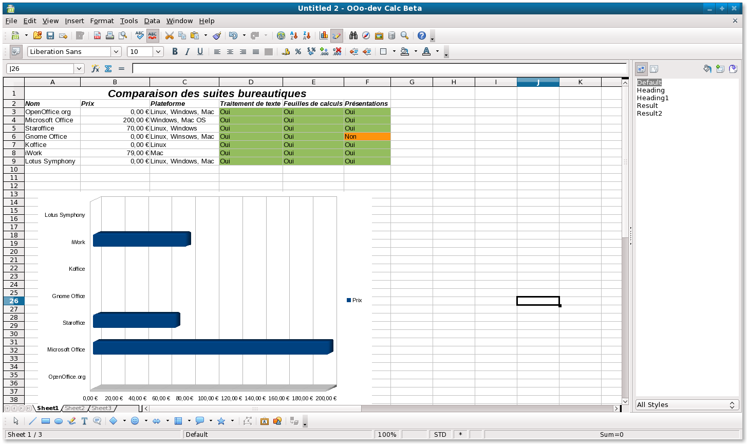 Calc 3.0 Beta